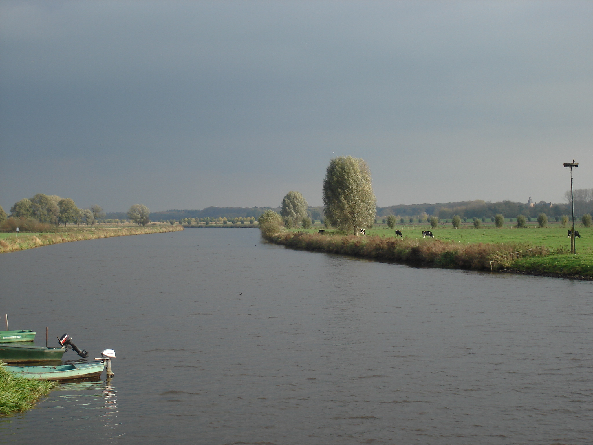 Omschrijving: Vecht river, near Dalfsen, Overijssel, the Netherlands